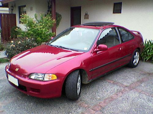 Quinta generación Honda Civic Coupe 1994